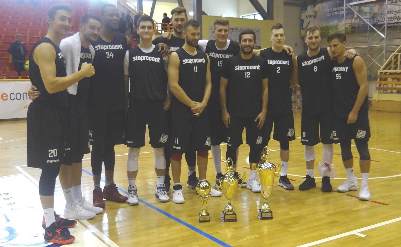 King Szczecin (23.09.2018)